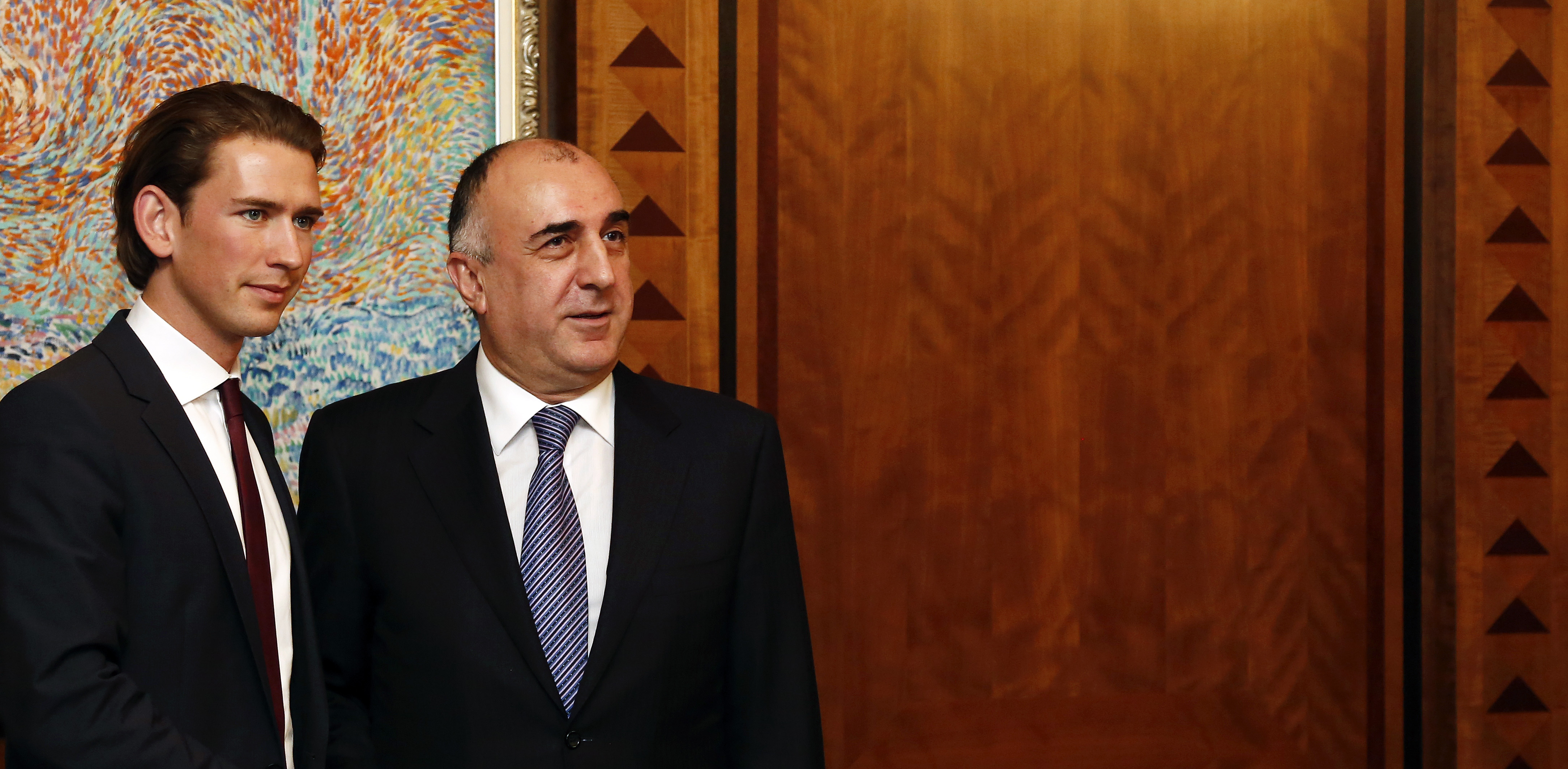 Arbeitsbesuch Aserbaidschan. Bundesminister Sebastian Kurz trifft den Außenminister der Republik Aserbaidschan Elmar Mammadjarov. Baku, 11.09.2014. Foto: Dragan Tatic